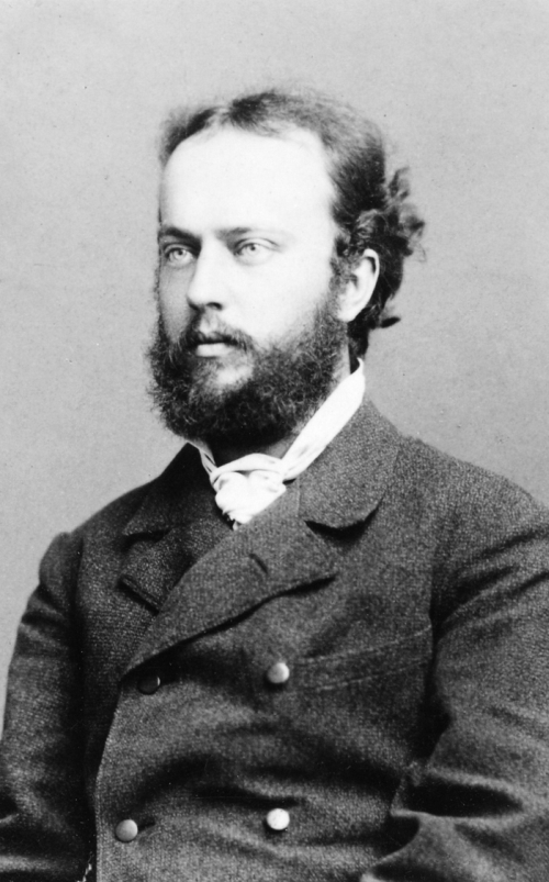 Porträt Ferdinand Avenarius